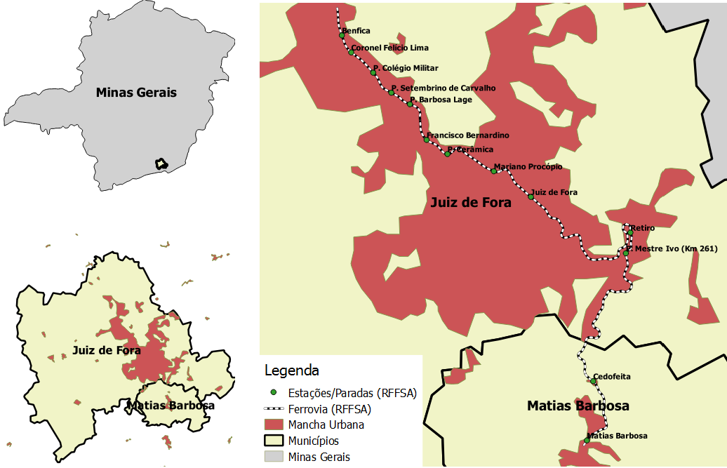 Mapa do Trem Urbano de Juiz de Fora